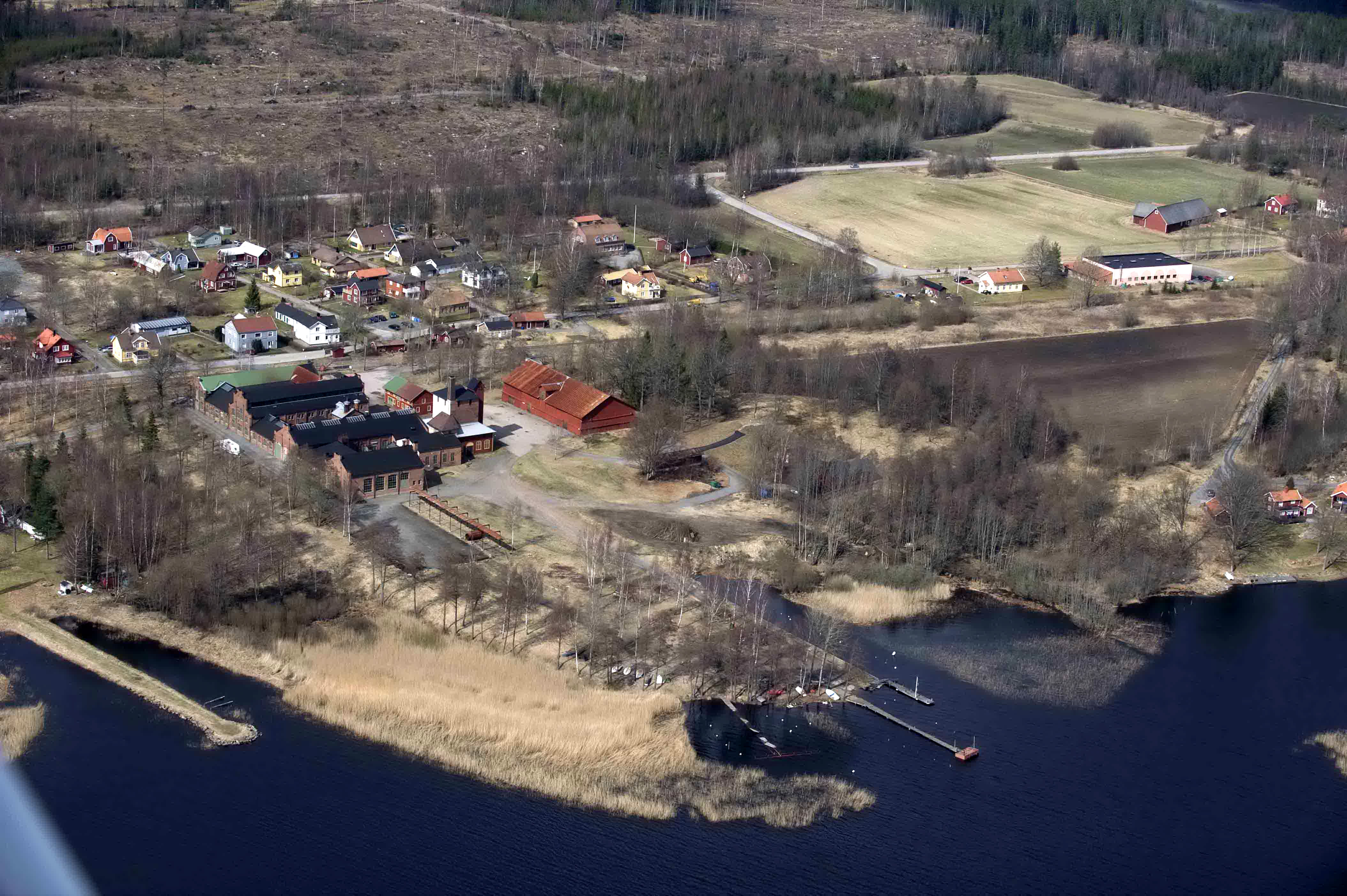 Åminne bruk från ovan